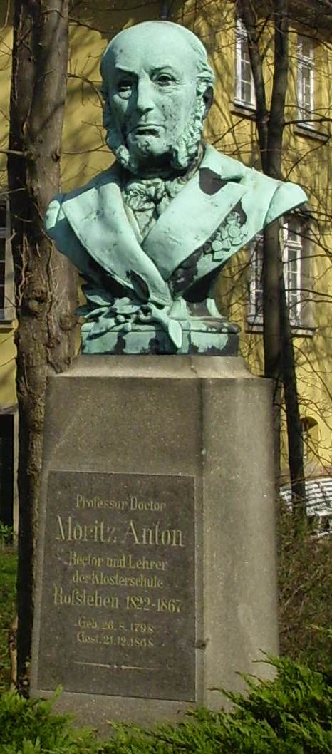 Denkmal des Schulleiters Moritz Anton auf dem Schulgelände der Klosterschule Roßleben